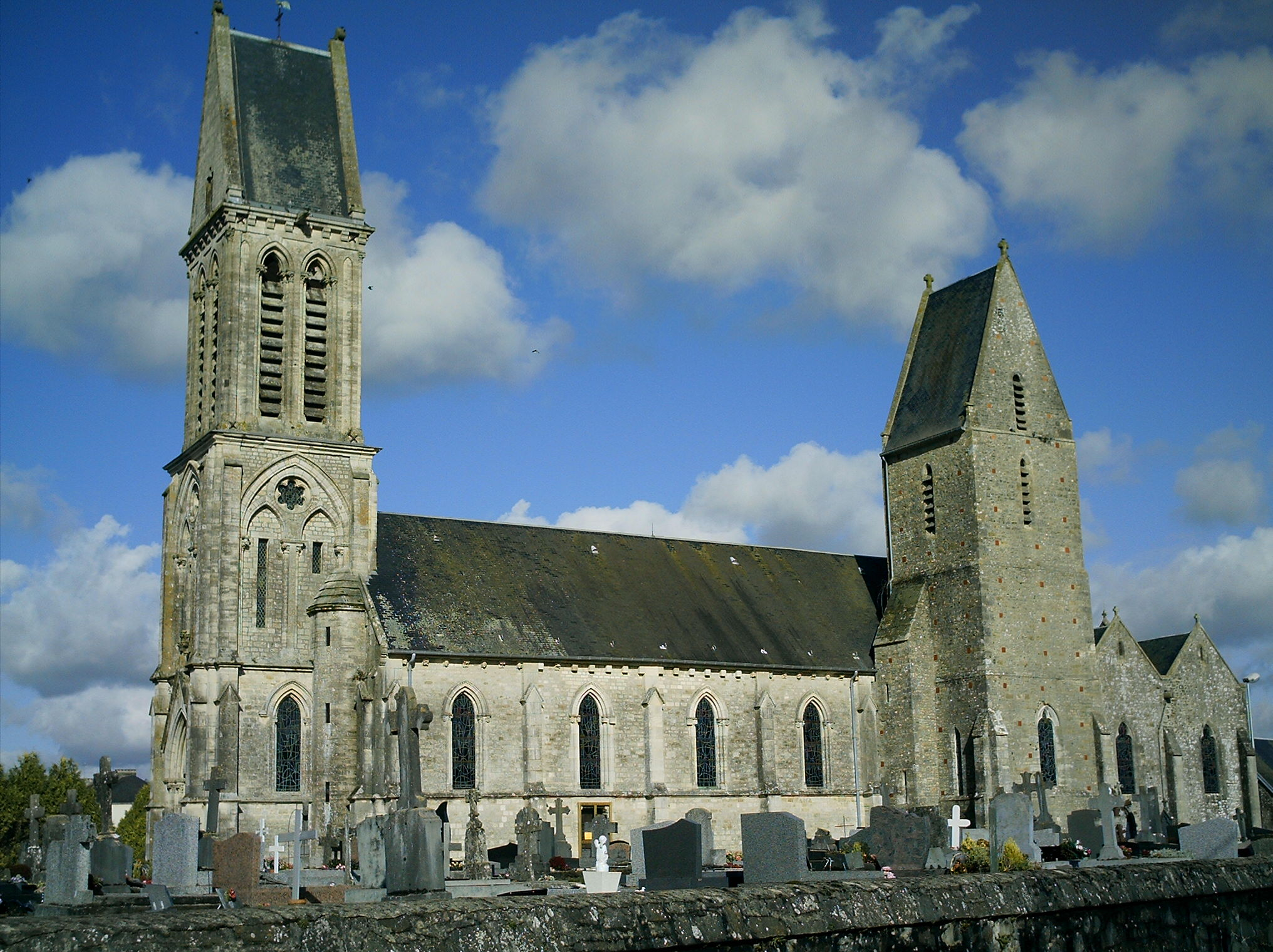 Eglise de Saint-Jores